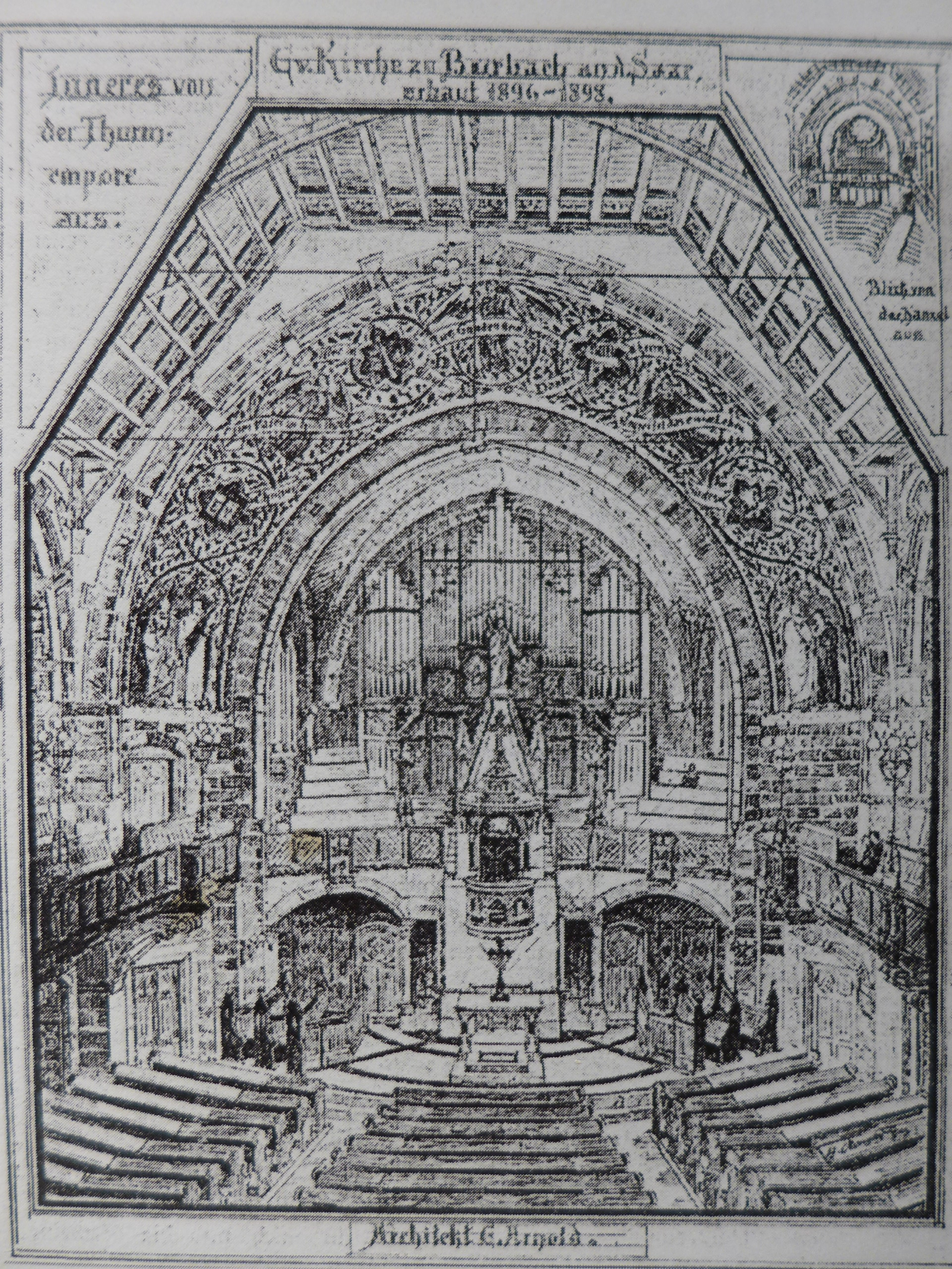 Matthäuskirche (Saarbrücken-Burbach), Entwurf Innenansicht zum Chor (Monatszeitschrift für Gottesdienst und kirchliche Kunst, 3, 1898)